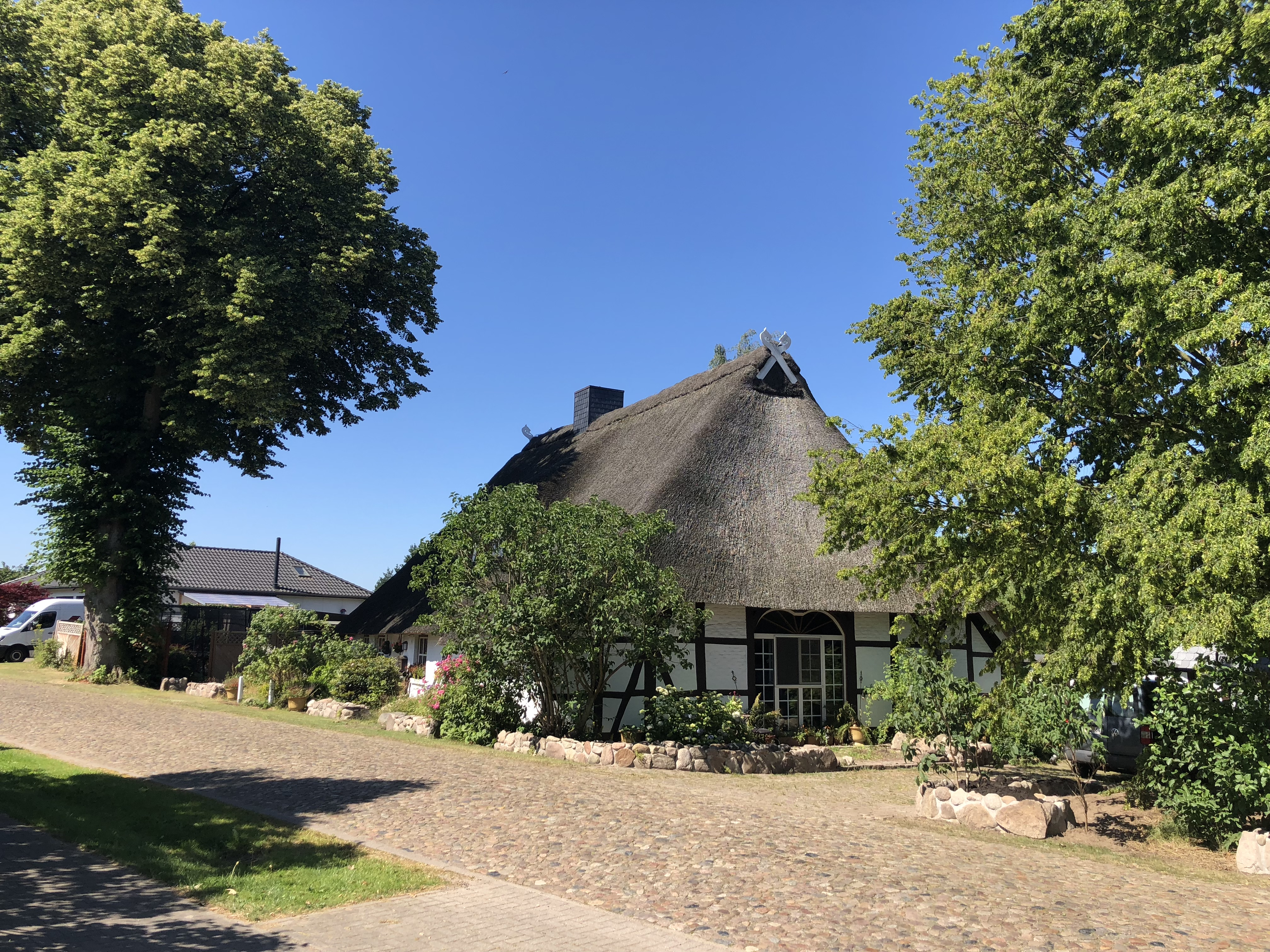 Ehmalig Buurnhuus in Ruschwedel